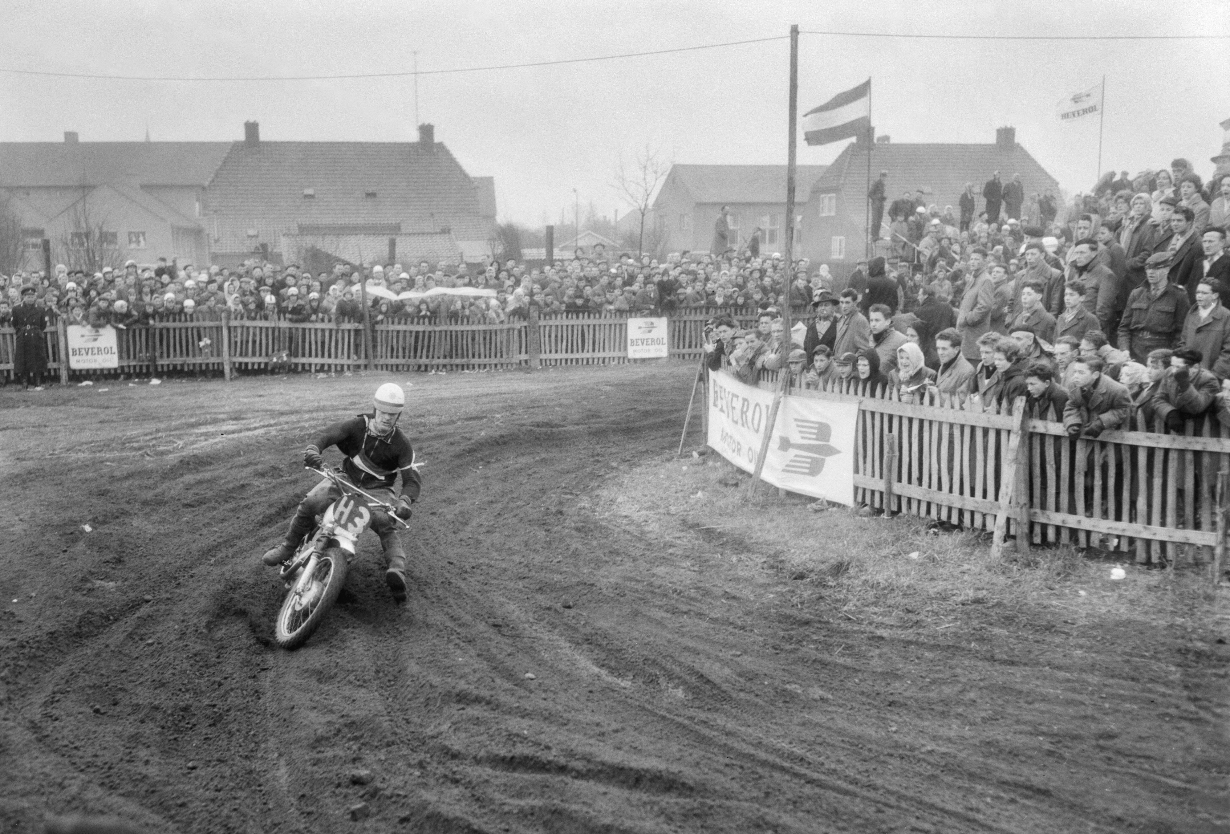 Collectie / Archief : Fotocollectie Anefo Reportage / Serie : [ onbekend ] Beschrijving : Internationale Motorcross 1959 in St. Anthonis Jan Clynk met gebroken kuitbeen Datum : 15 maart 1959 Locatie : Noord-Brabant, Sint Anthonis Trefwoorden : Motorcross Persoonsnaam : Jan Clynk Fotograaf : Pot, Harry / Anefo Auteursrechthebbende : Nationaal Archief Materiaalsoort : Negatief (zwart/wit) Nummer archiefinventaris : bekijk toegang 2.24.01.04 Bestanddeelnummer : 910-2173